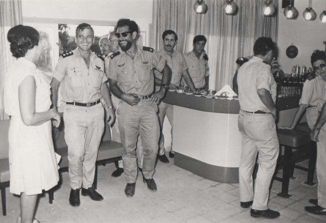 דב שפיר ושאול סלע במסיבה בבסיס חיפה